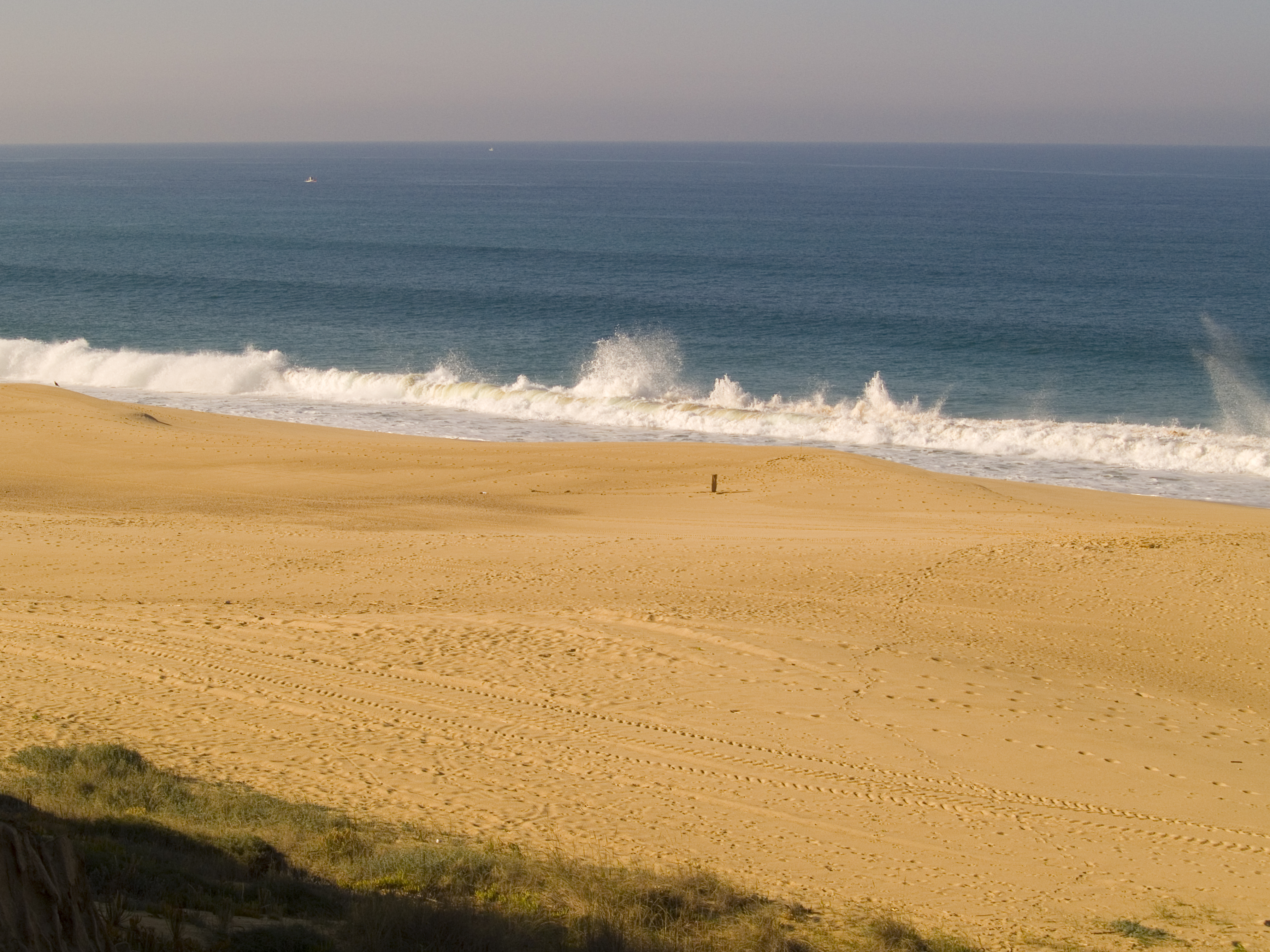 MECO